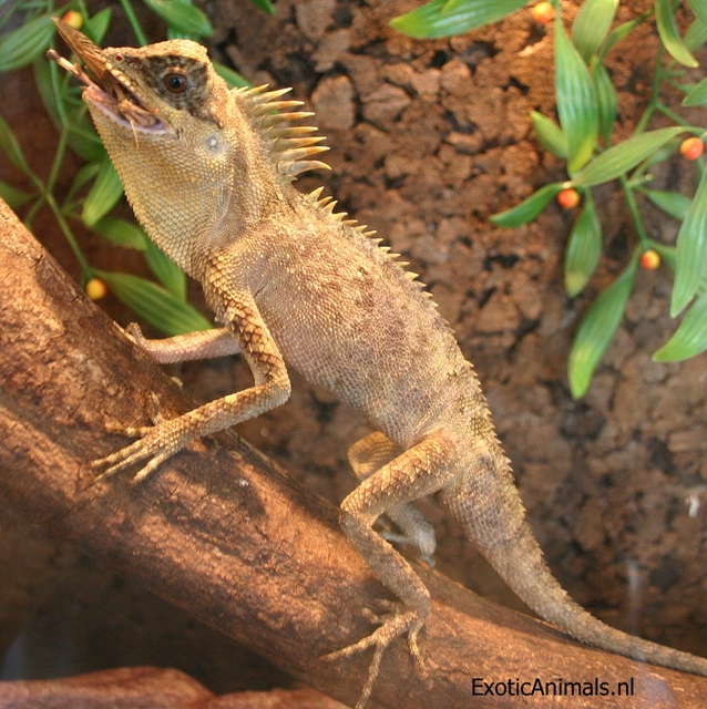 Exoticanimals.nl